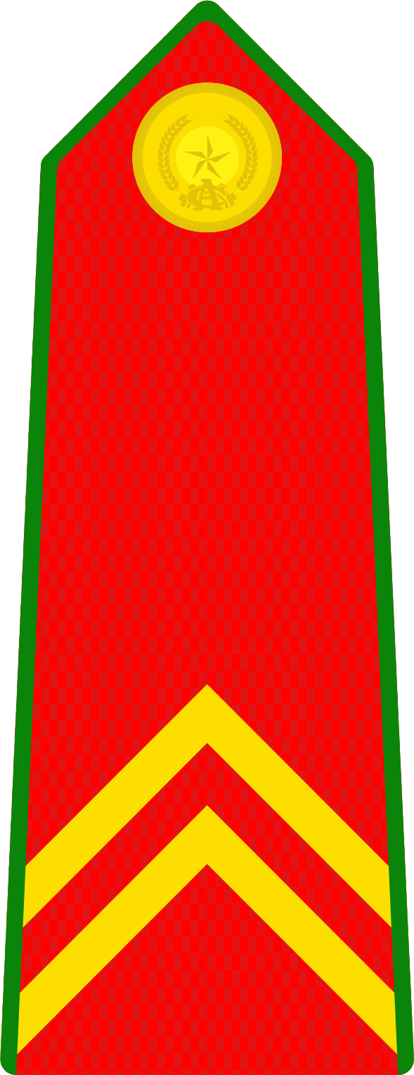 Cấp hiệu Chiến sĩ bậc 1 Công an